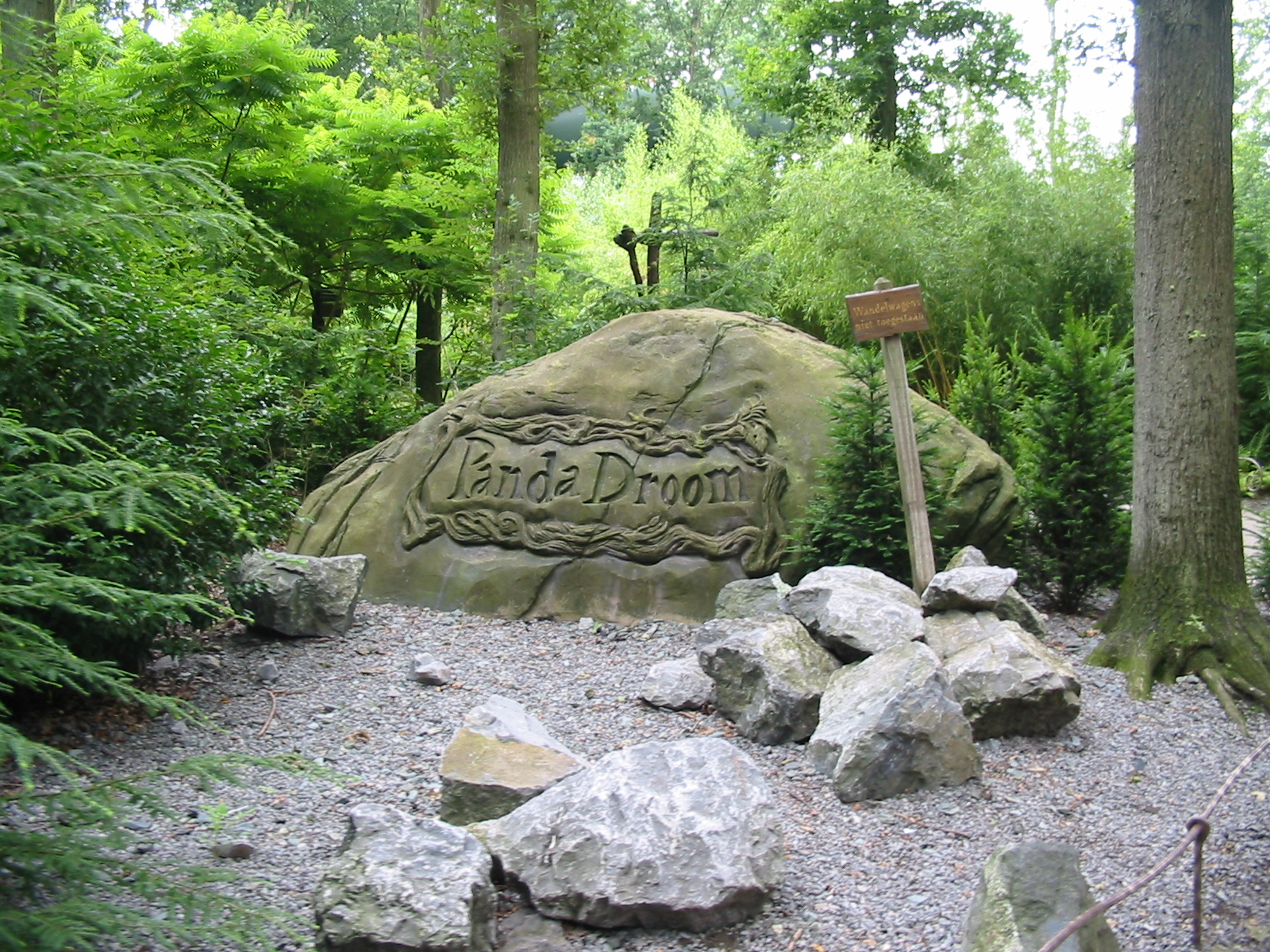 Ingang Pandadroom.